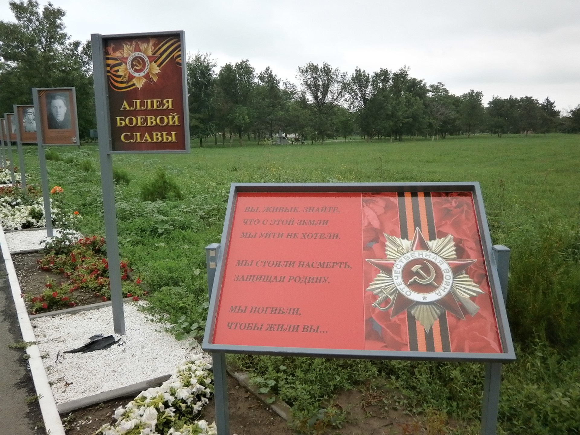 Аллея боевой славы в посёлке Весёлый Ростовской области